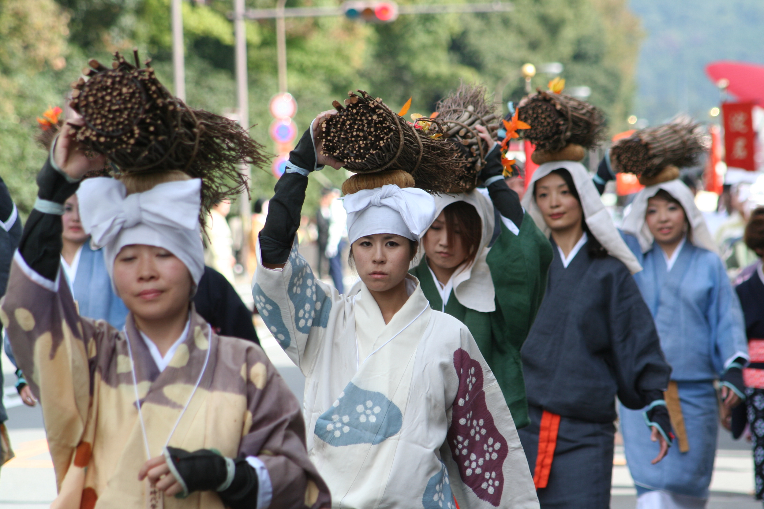 京都府京都市にて開催された時代祭。正午の御所から平安神宮までの行進の様子。2009年10月22日撮影。中世婦人列 大原女。室町時代末期の女性衣装。大原女とは（おおはらめ）と読み、洛北大原から都へ薪を売りに来ていた女性達のこと。